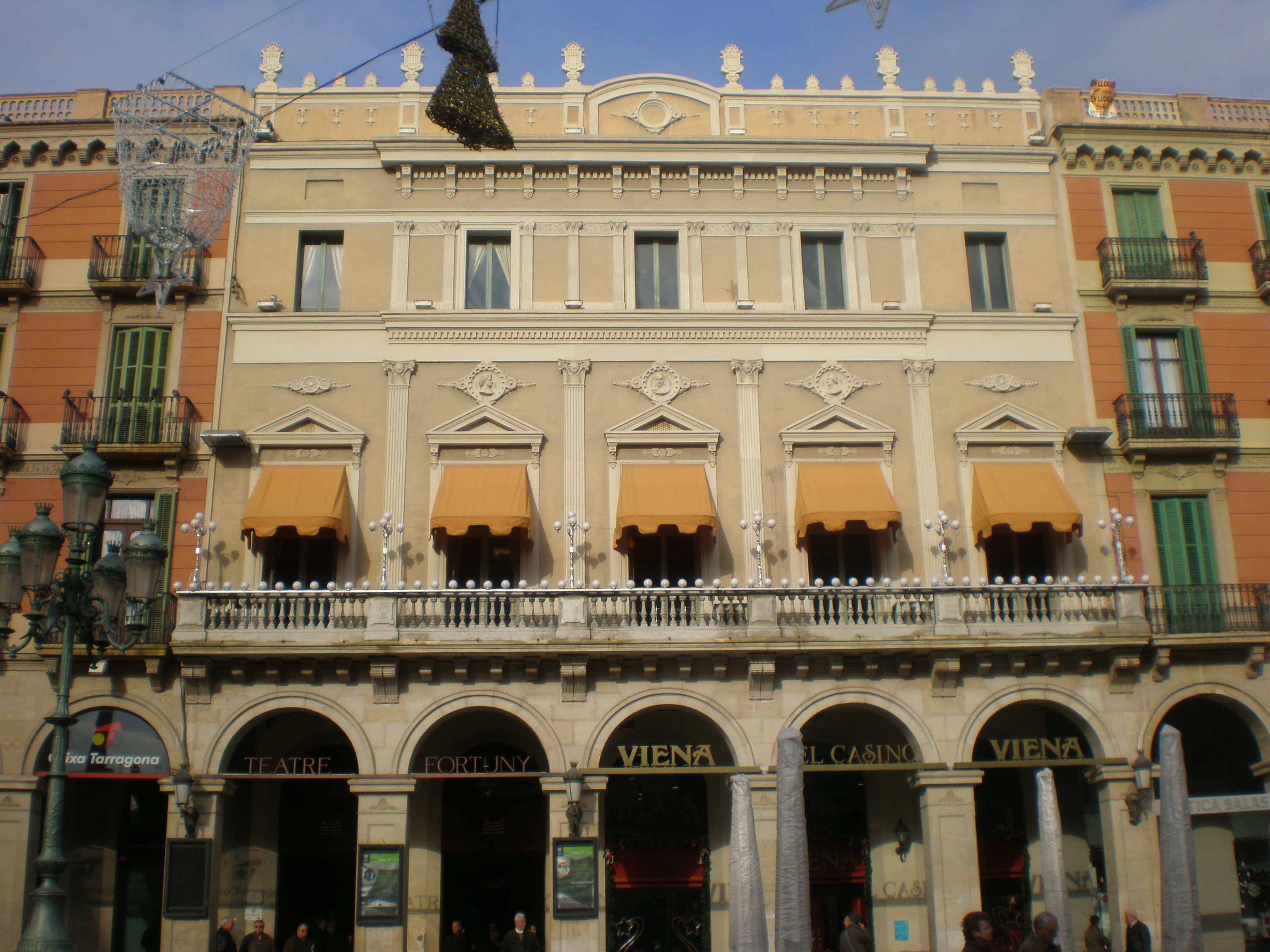 Reus - Teatre Fortuny. De regust vienès, edificat el 1880 amb la voluntat de dotar Reus d´un teatre de nivell europeu i inaugurat el 1882. El teatre és obra de Francesc Blanch i Pons.